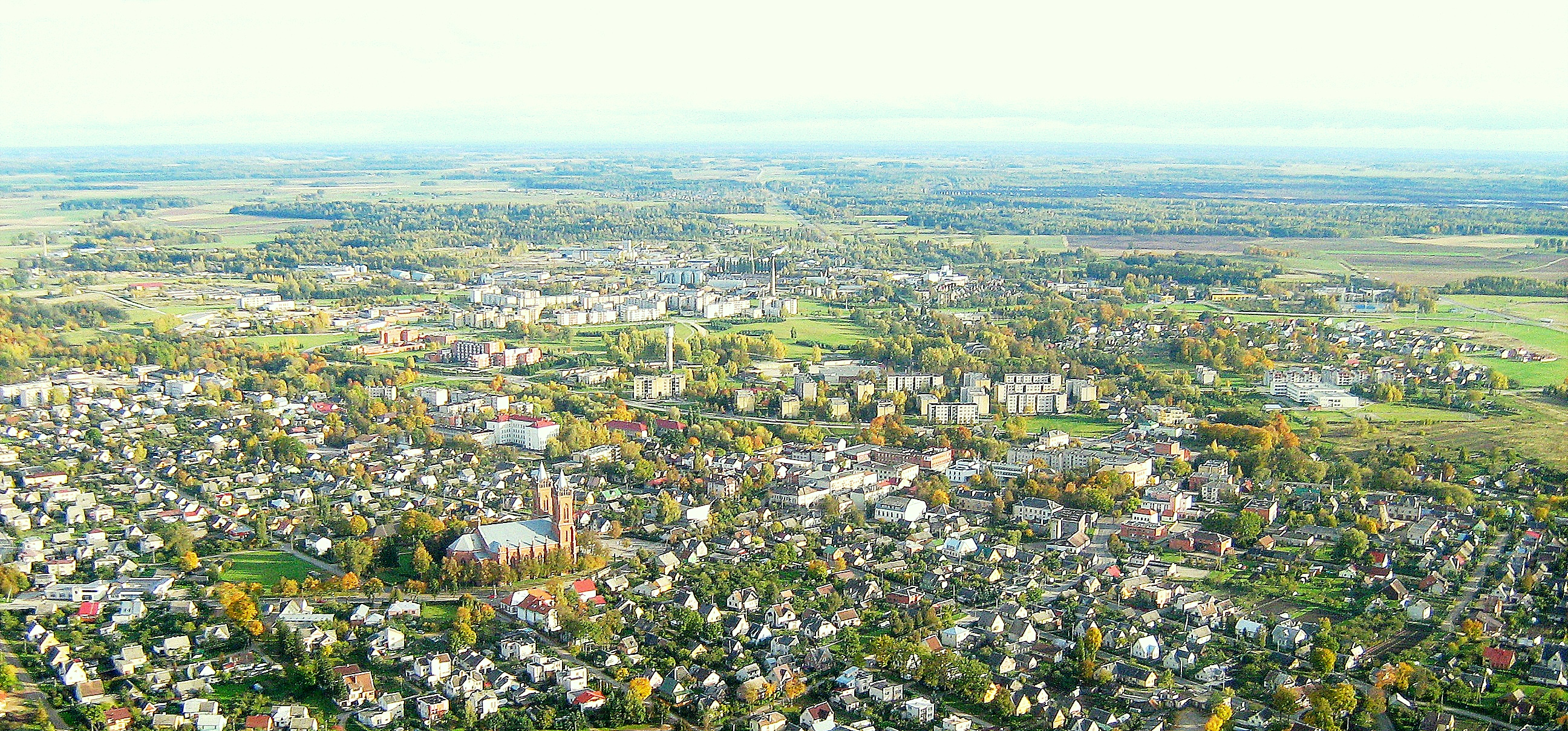 Kupiškio miesto panorama